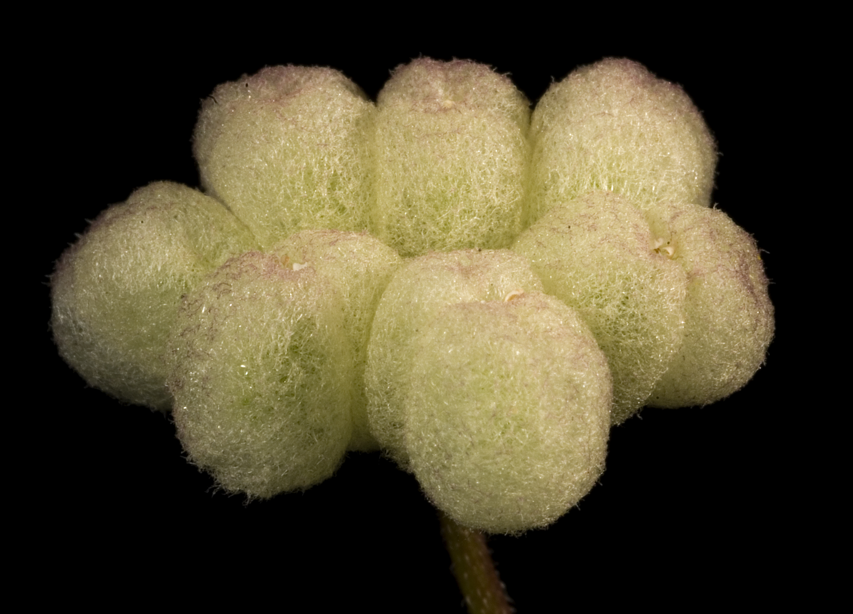 KRT3358